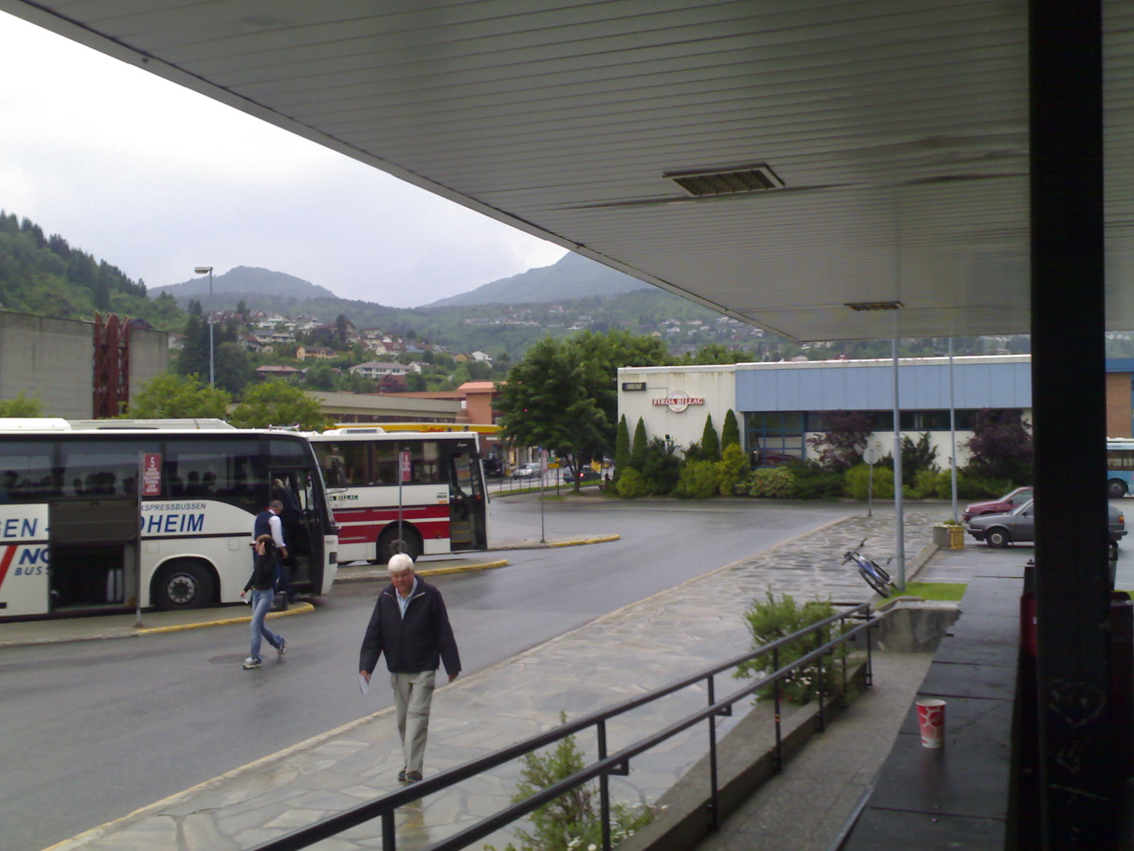 Førde rutebilstasjon